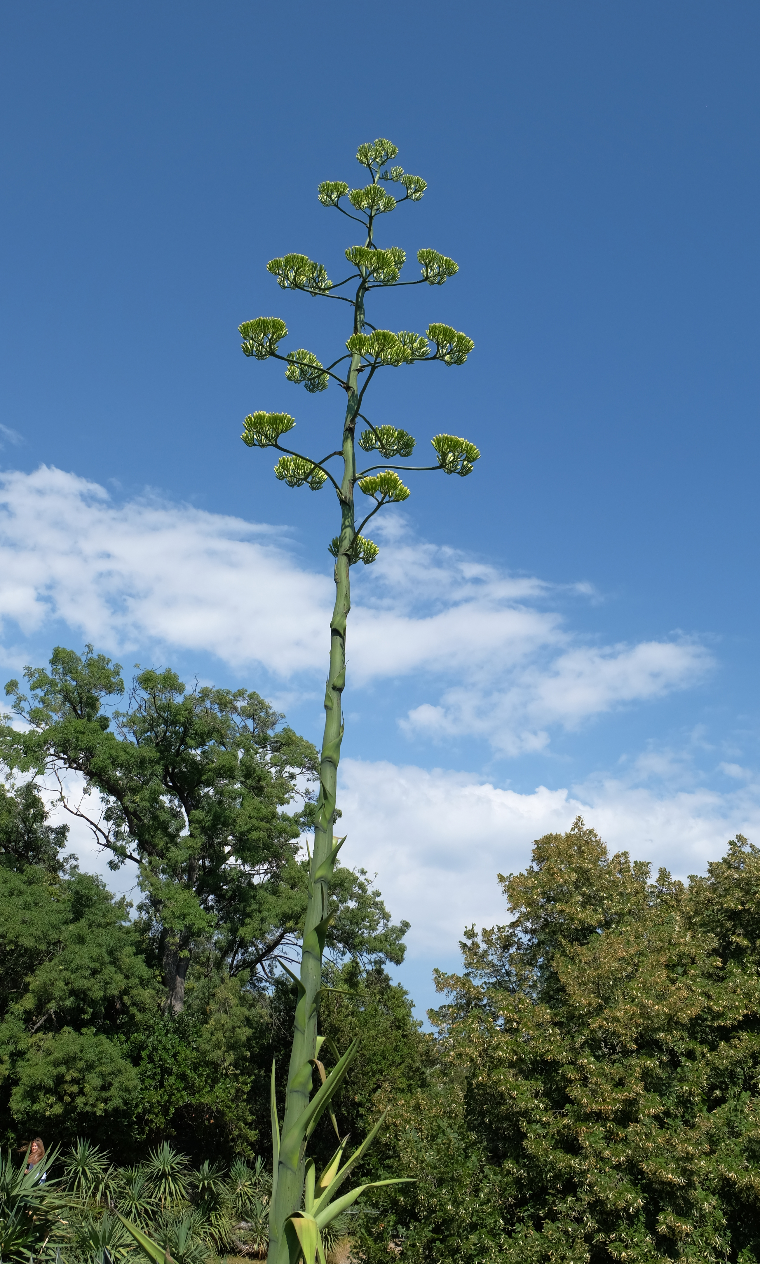 Соцветие американской агавы. Воронцовский парк (Крым, Алупка). Июль 2017 года